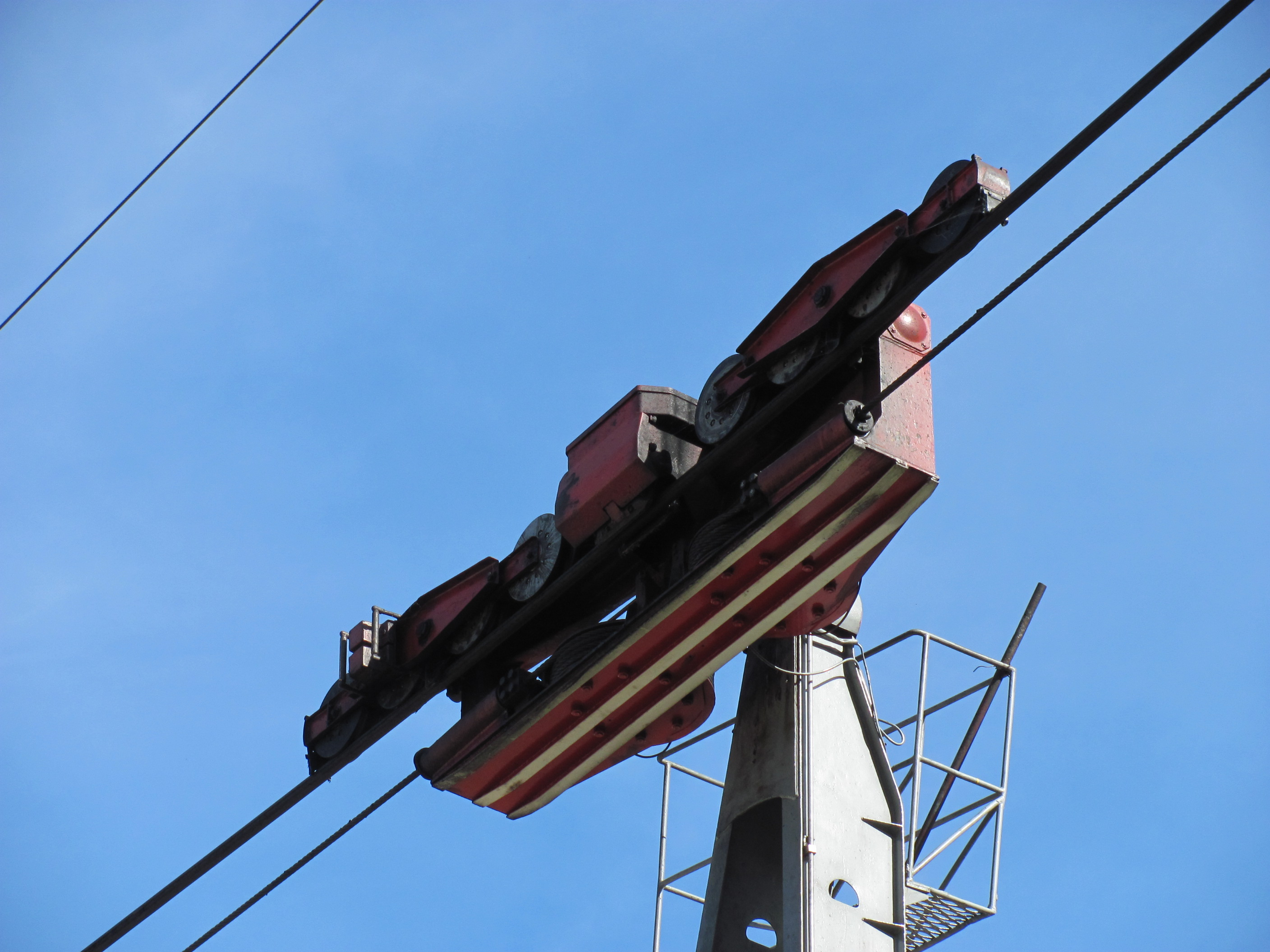 Rolele de sustinere ale telecabinei Busteni-Babele (25 Aprilie 2011)